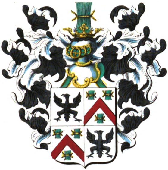 Armoiries de la famille Ullens de Schooten